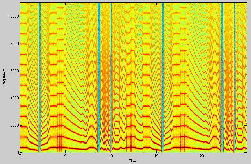 Akustisches Spektrum eines FM-Signals